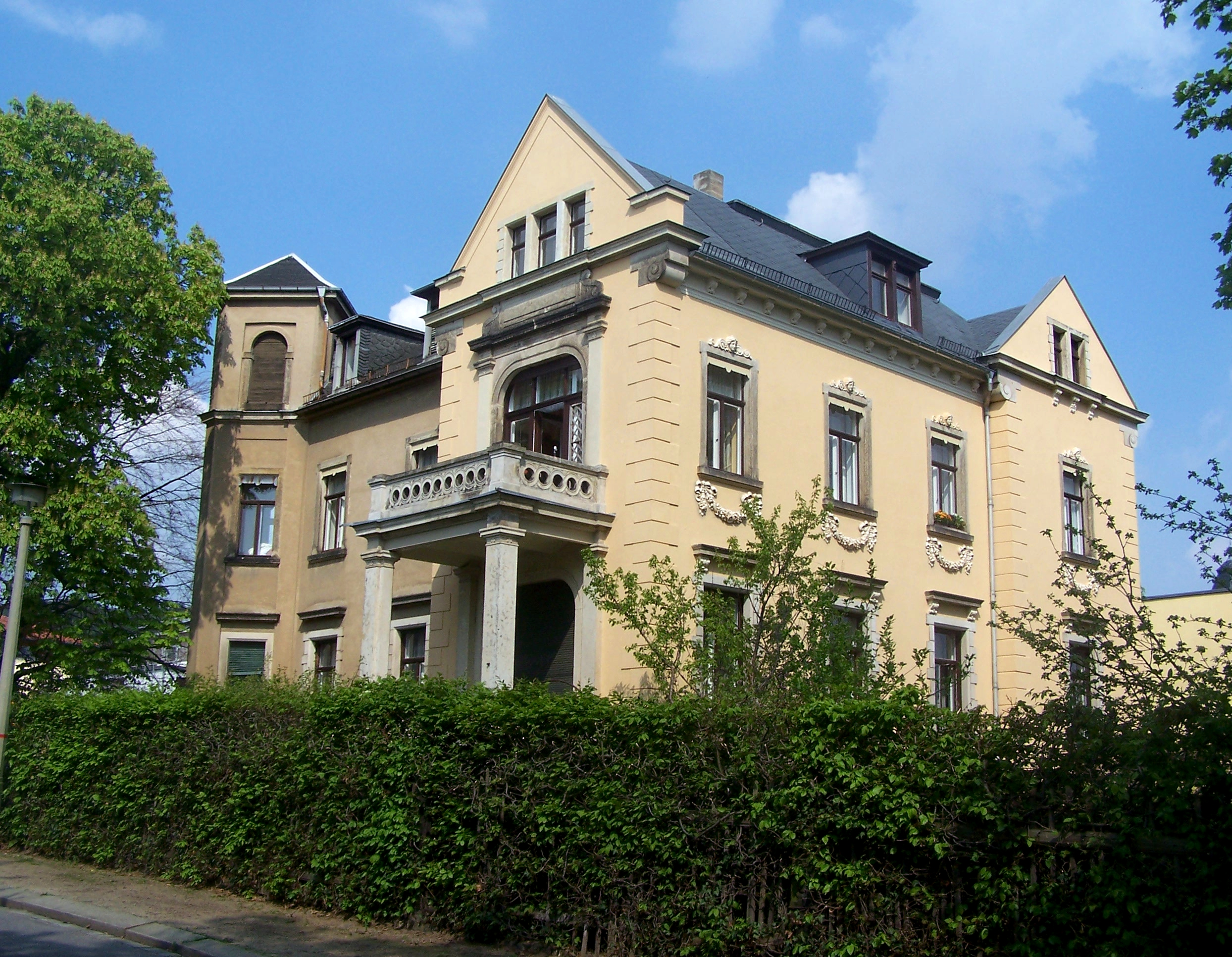 Wasastr. 68 in Radebeul